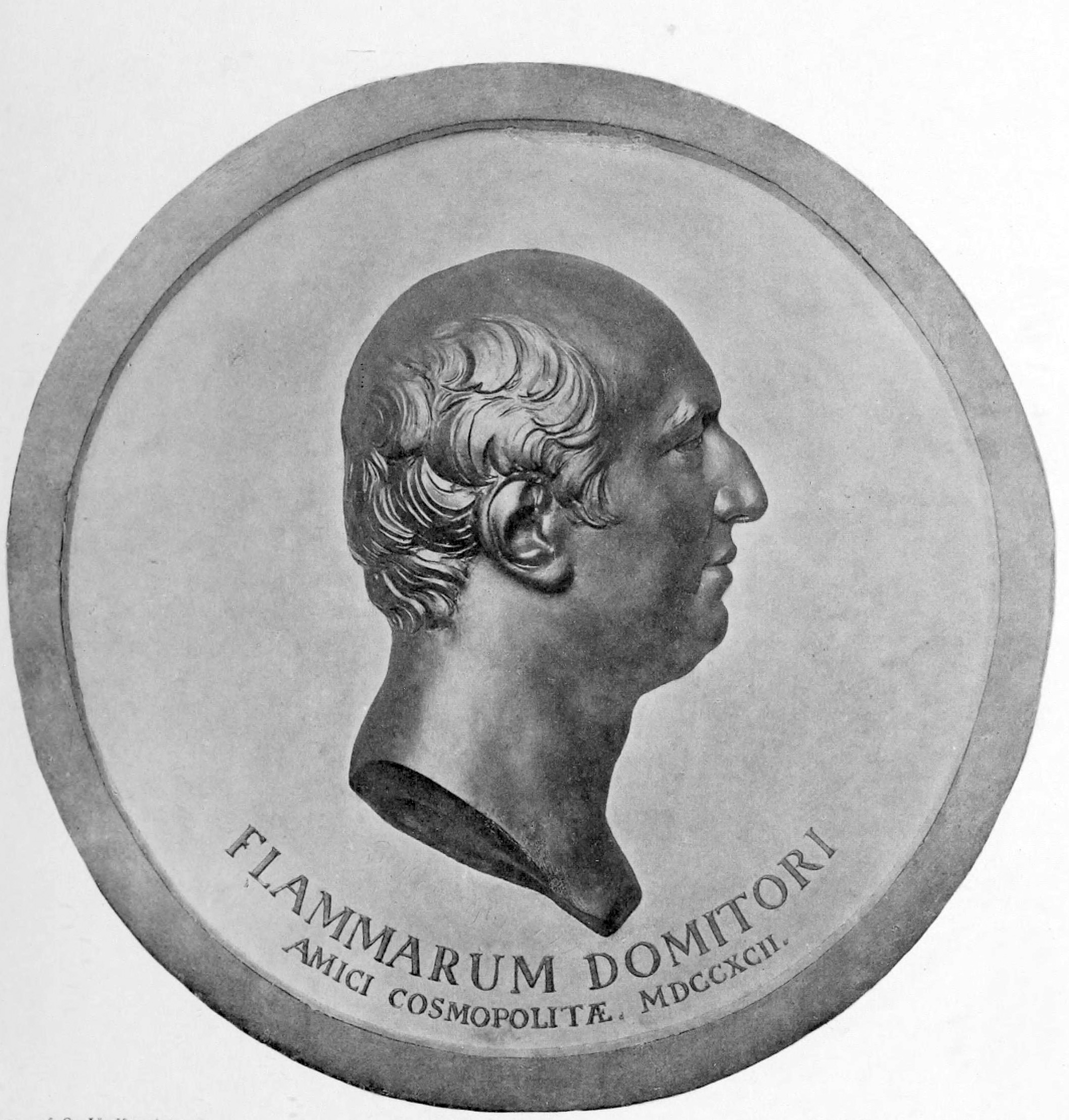 Franz Joakim von Aken (1738-1798). Något äldre man, bröstbild profil t. v. med kalt hufvud, sid- och nackhåret kort och vågigt, bar hals. Signerad under afskärningen: S. Hoffmeister 1792. Under står: Flammarum Domitori amici cosmopolitæ. MDCCXCII. Gipsmedaljong med upphöjd kant af en järnomramning, 64 ctm. i diameter, af Samuel Hoffmeister 1792. Tillhör Herr kamrer C. J. Broms, Nyköping.